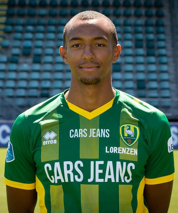 Melvyn Lorenzen